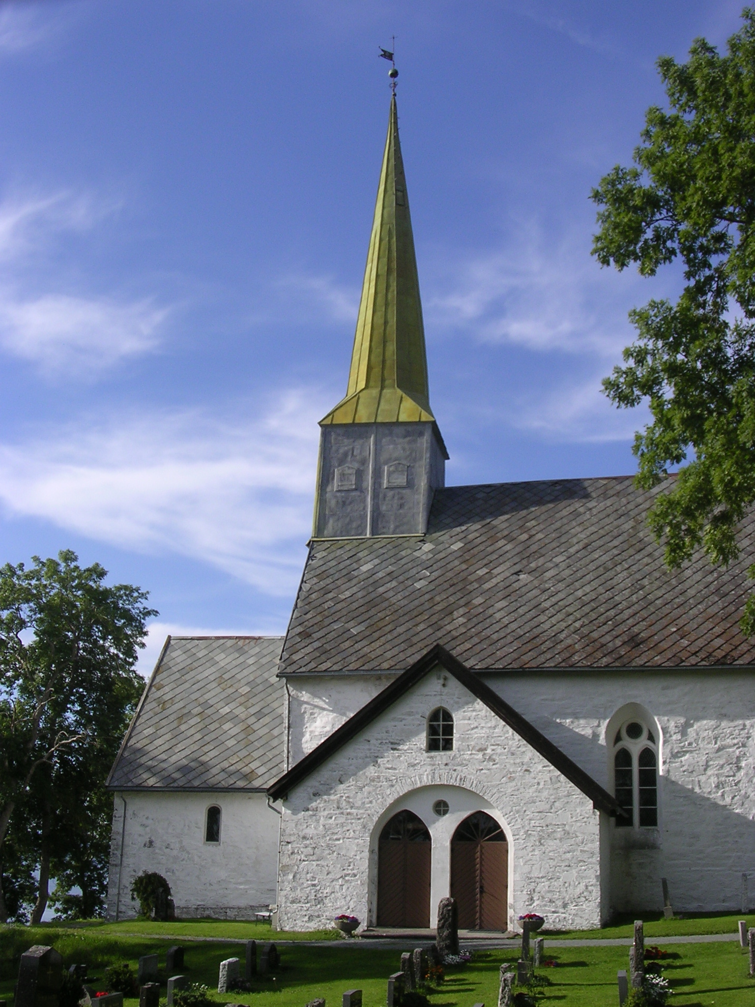 Alstadhaug kirke i Levanger kommune i Nord-Trøndelag, fra 1100- tallet